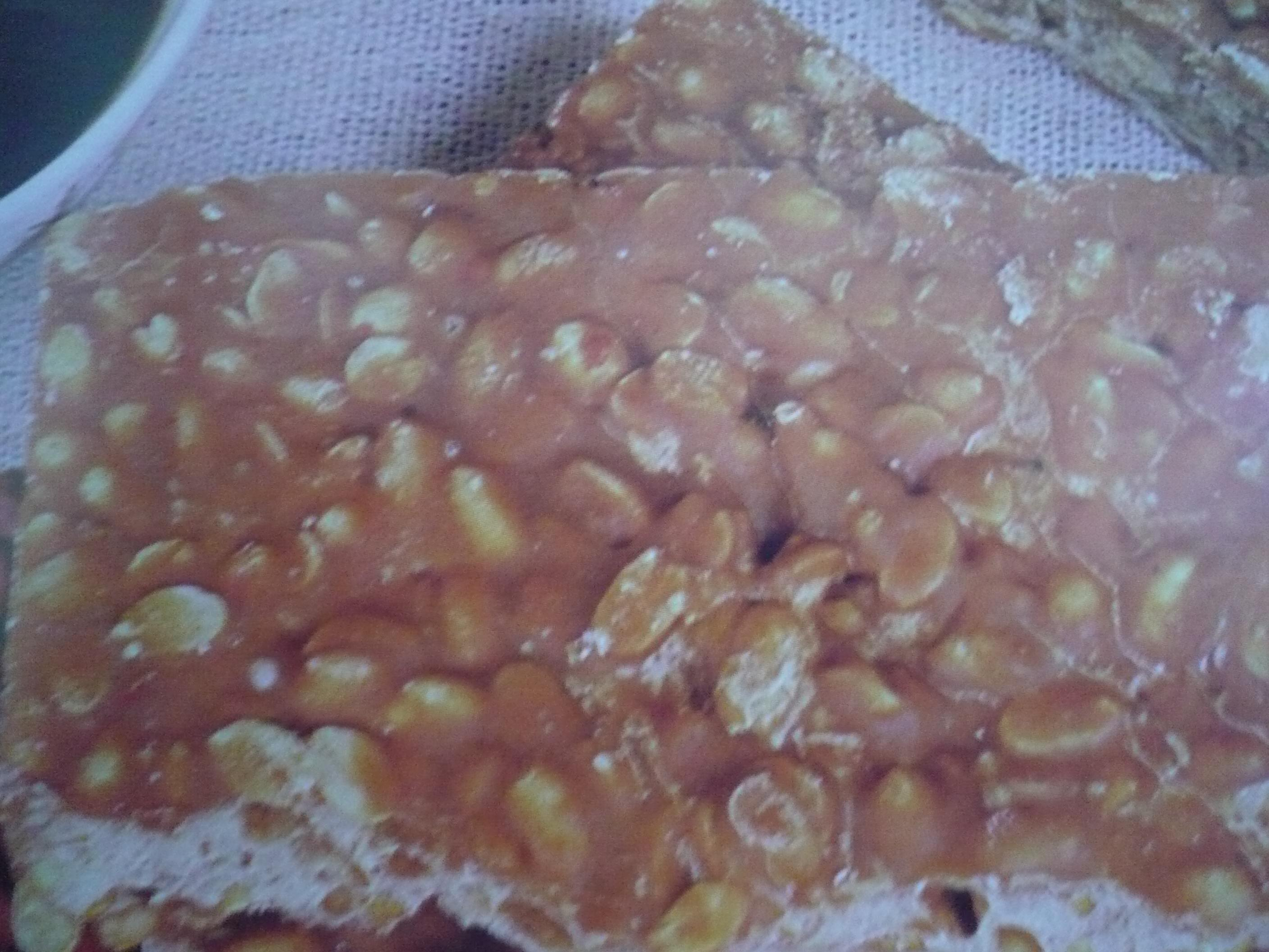 foto de ka'í ladrillo